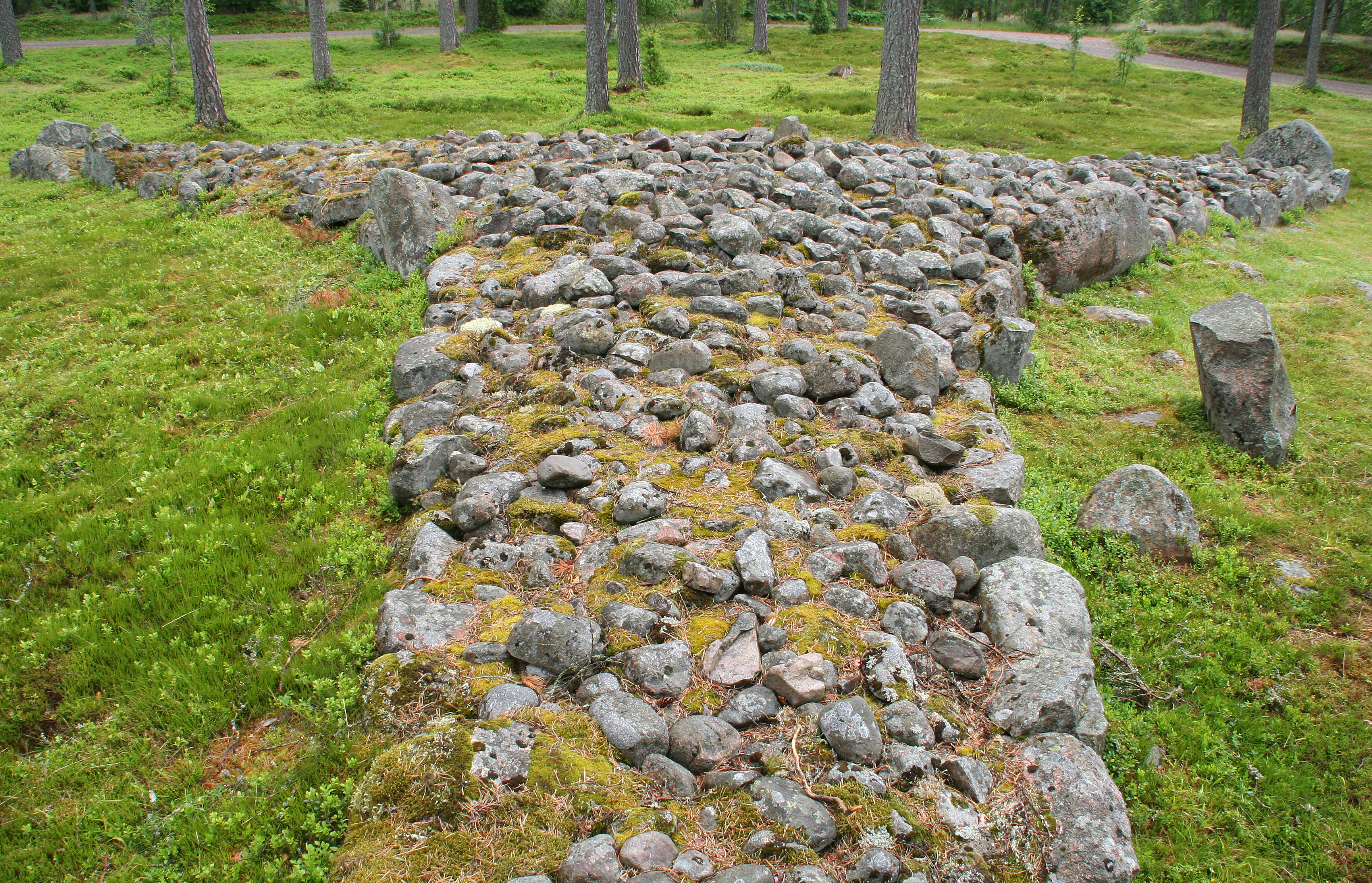 Treudden på gravfältet Torsa stenar (Raä-nr Almesåkra 45:1) i Almesåkra socken, Nässjö kommun, Jönköpings län, Småland, Sverige.